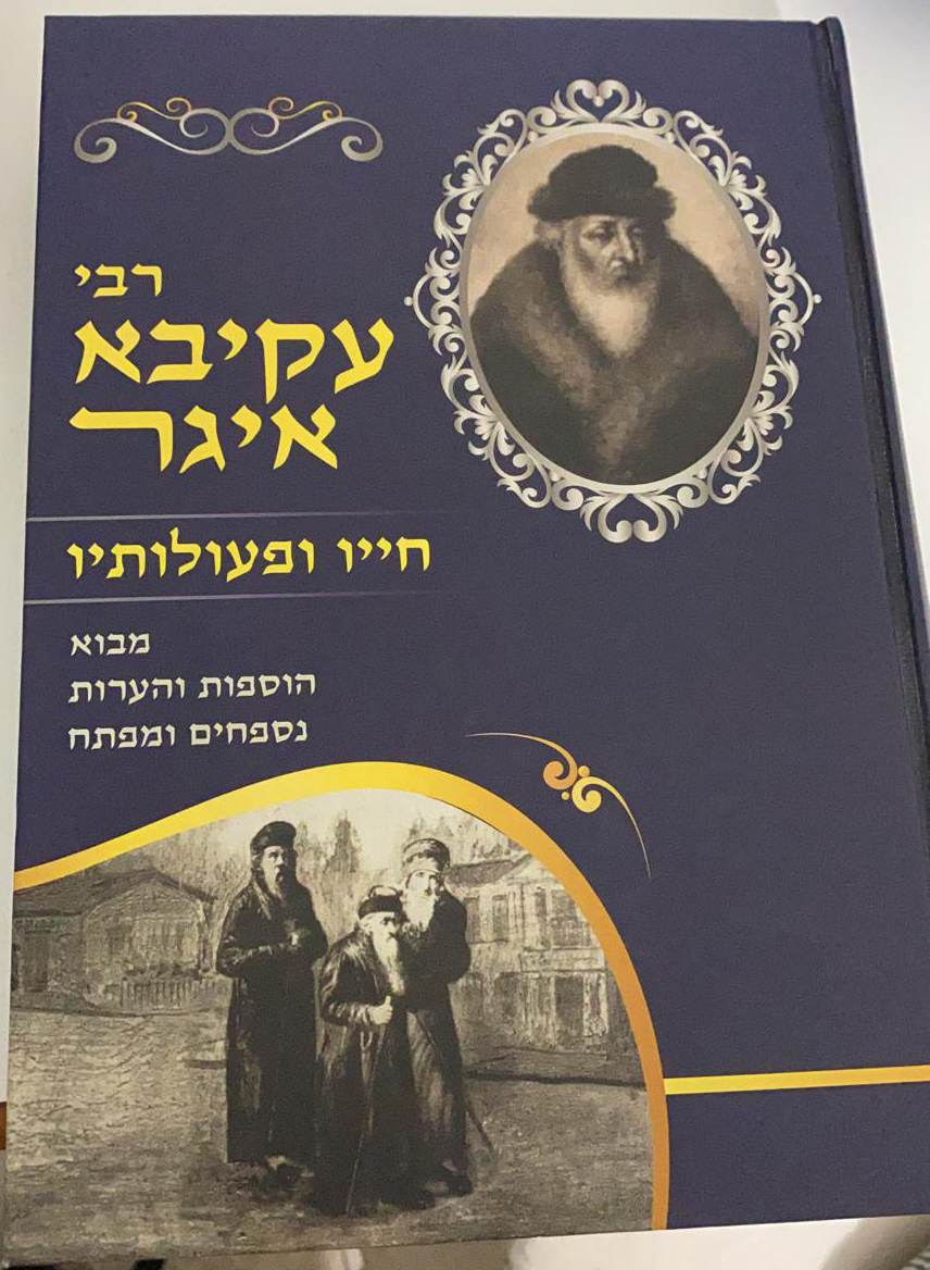 Życie i działania Rabiny Akivy Egera